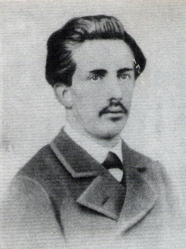 Ignacio Carrera Pinto en 1869. Ignacio José Carrera Pinto (Santiago, Chile, 5 de febrero de 1848-Concepción,n 1 Perú, 10 de julio de 1882) fue un militar chileno, capitán de la 4.ª Compañía del Batallón 6.º de Línea «Chacabuco», muerto al mando de sus hombres en la batalla de La Concepción.